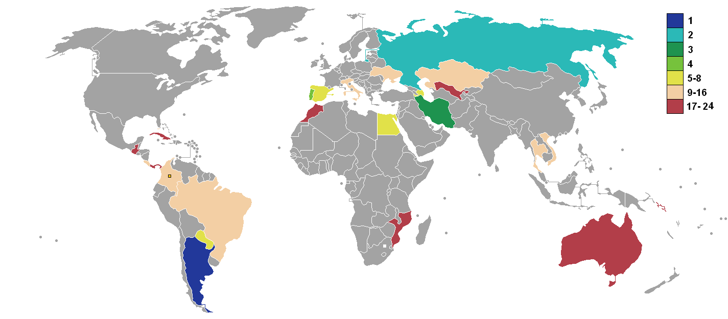 Resultado de los países